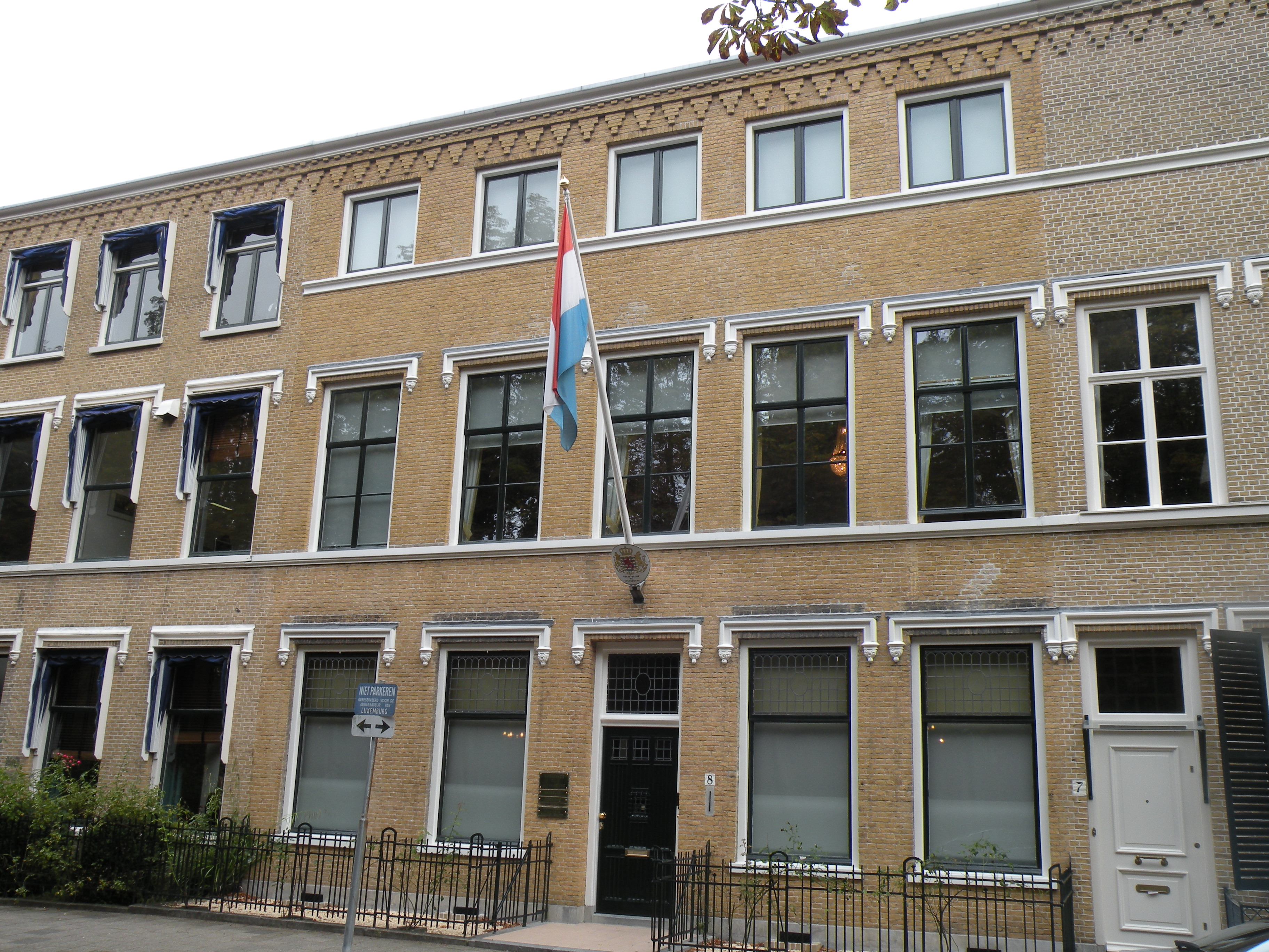 Den Haag - Nassaulaan 8 - Rijksmonument